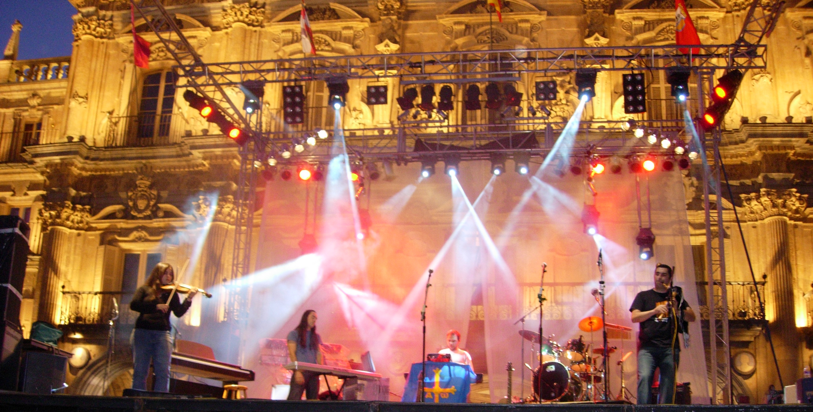 Xera in concert (Salamanca, Spain)